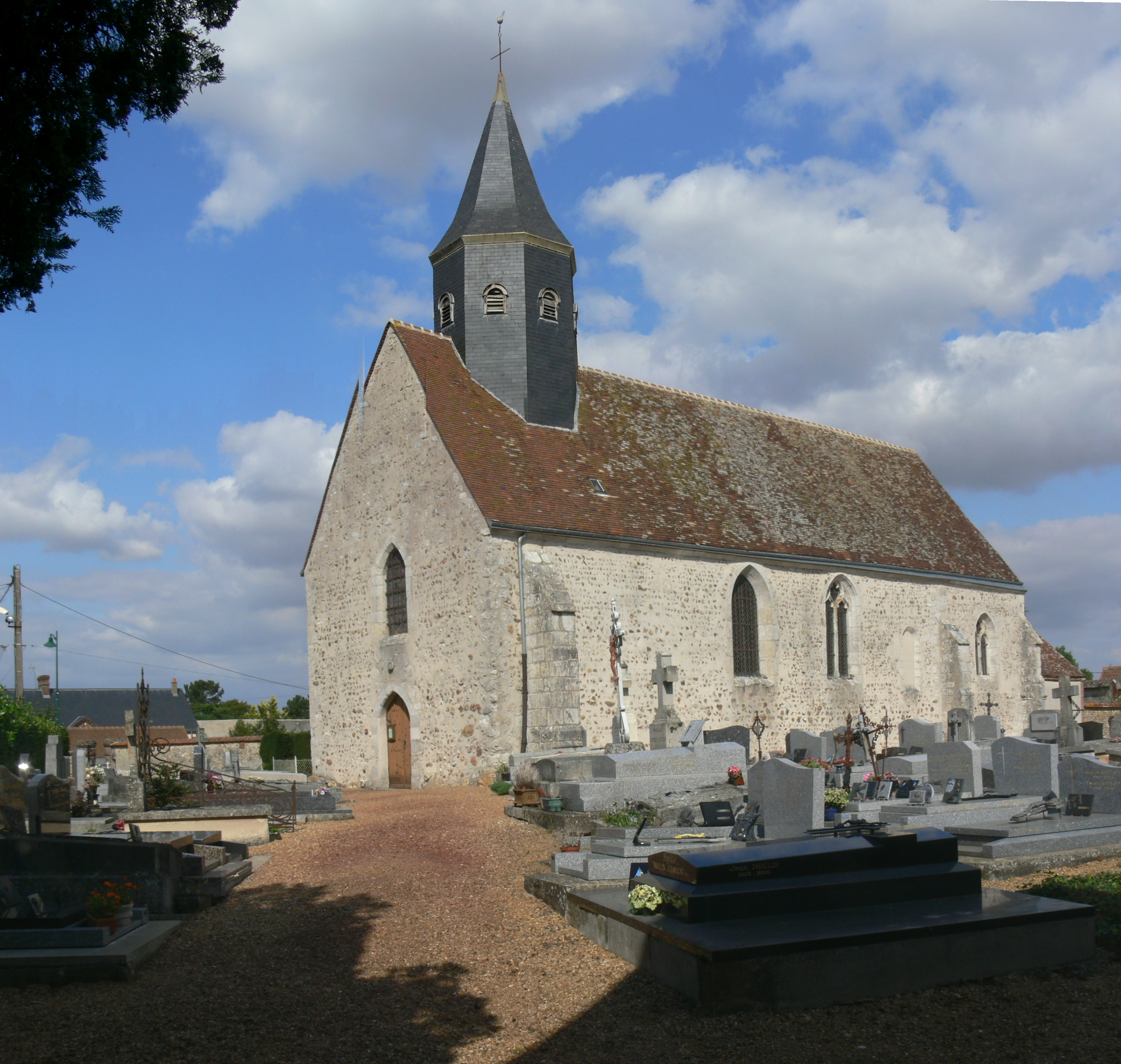 église Saint-Martin